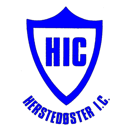 Herstedøster I.C. logo